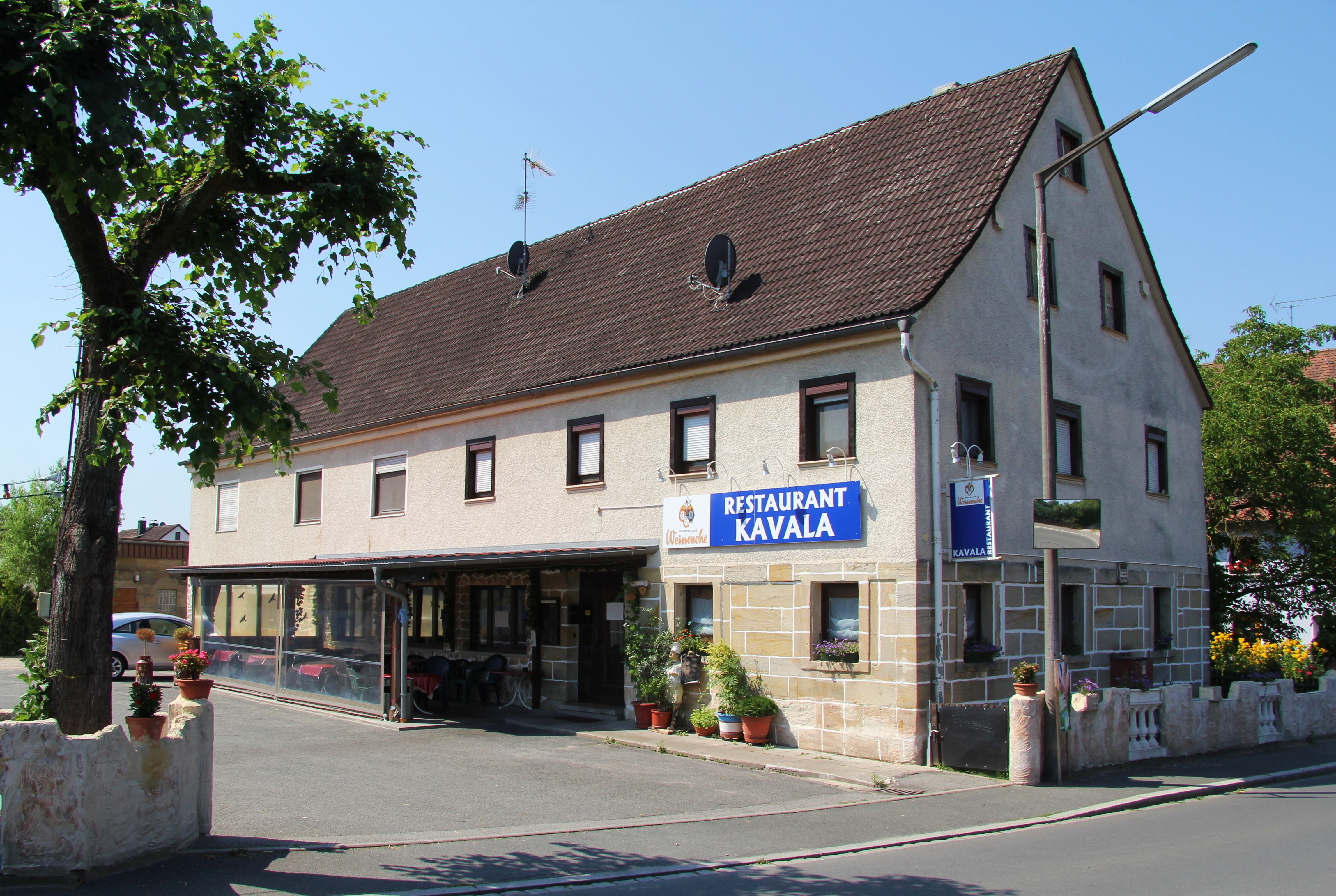 Ehemaliges Gasthaus zur Grünen Laube, Eckenhaider Hauptstraße 28, Eckenhaid, Mittelfranken; HofseiteThis is a photograph of an architectural monument.